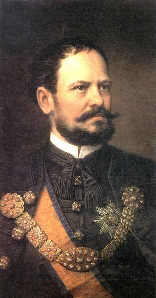 Bellusi Baross Gábor (1848-1892), közlekedéspolitikus, kereskedelemügyi miniszter.